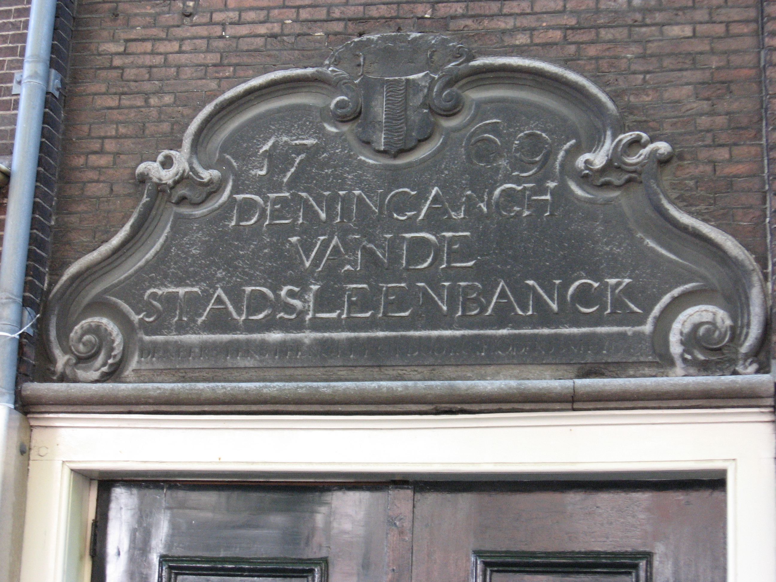 Burgwal 45, Delft